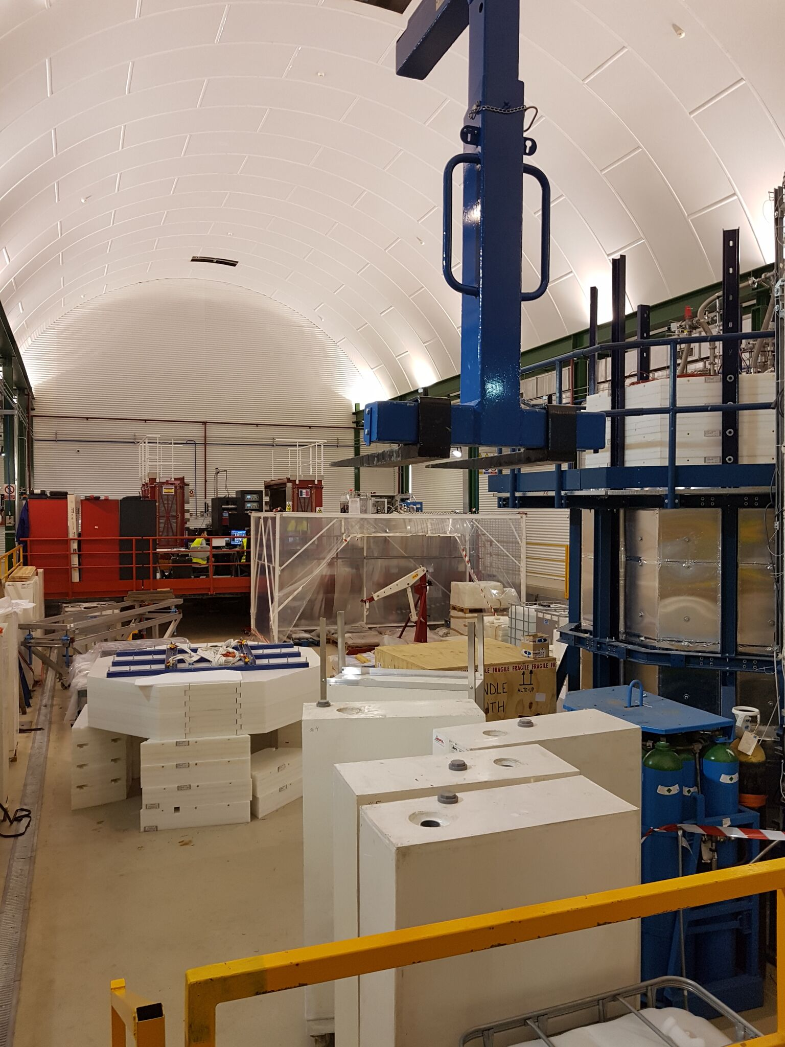 Laboratorio Subterráneo de Canfranc